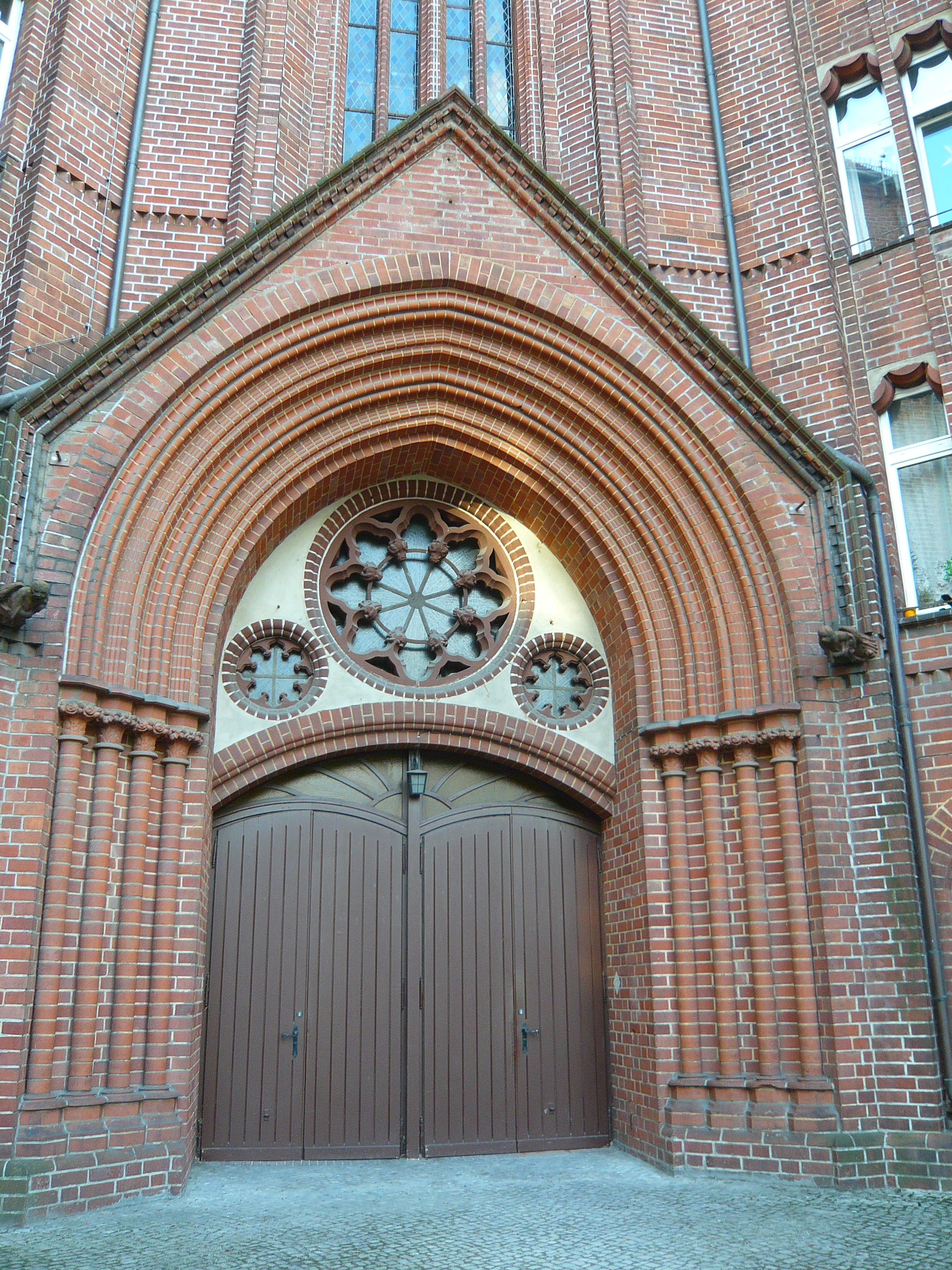 Kath. Kirche S. Corpus Christi, Prenzlauer Berg, Conrad-Blenkle-Straße